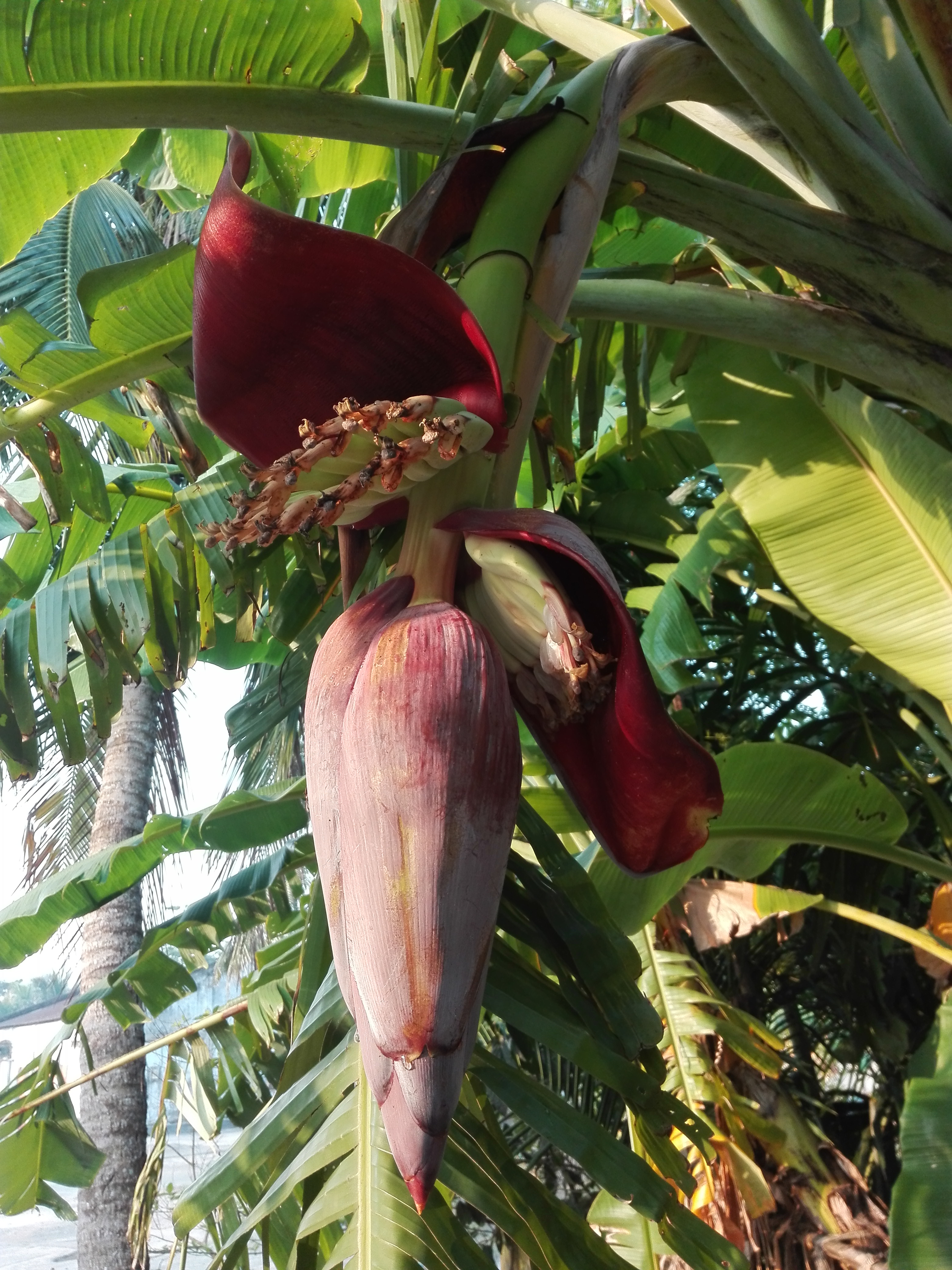 কলার ফুল যা মোচা নামেই পরিচিত।